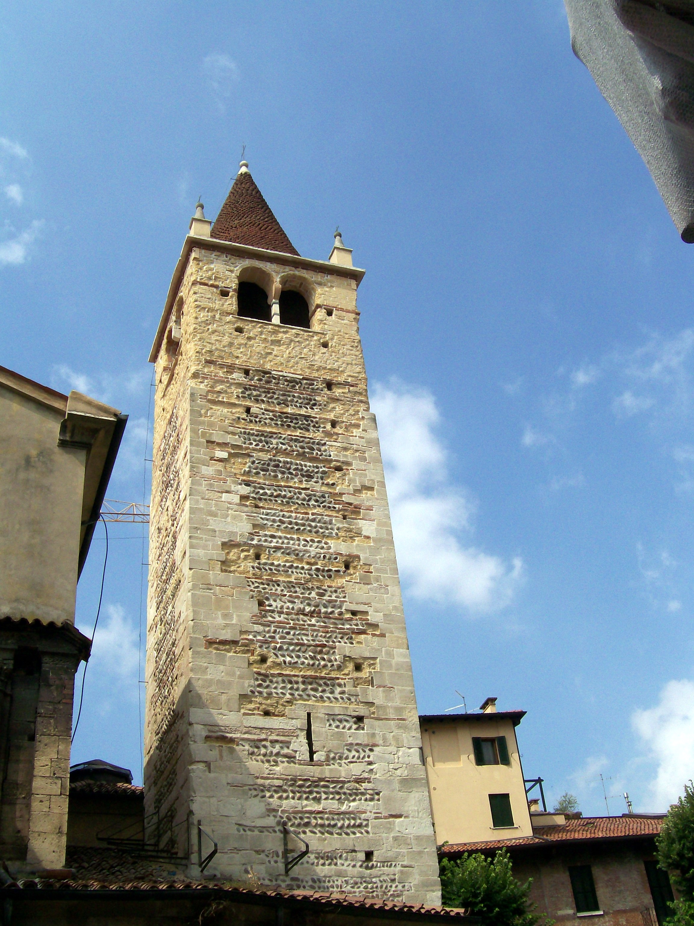 Campanile della chiesa parrocchiale dei Santi Apostoli in Verona.